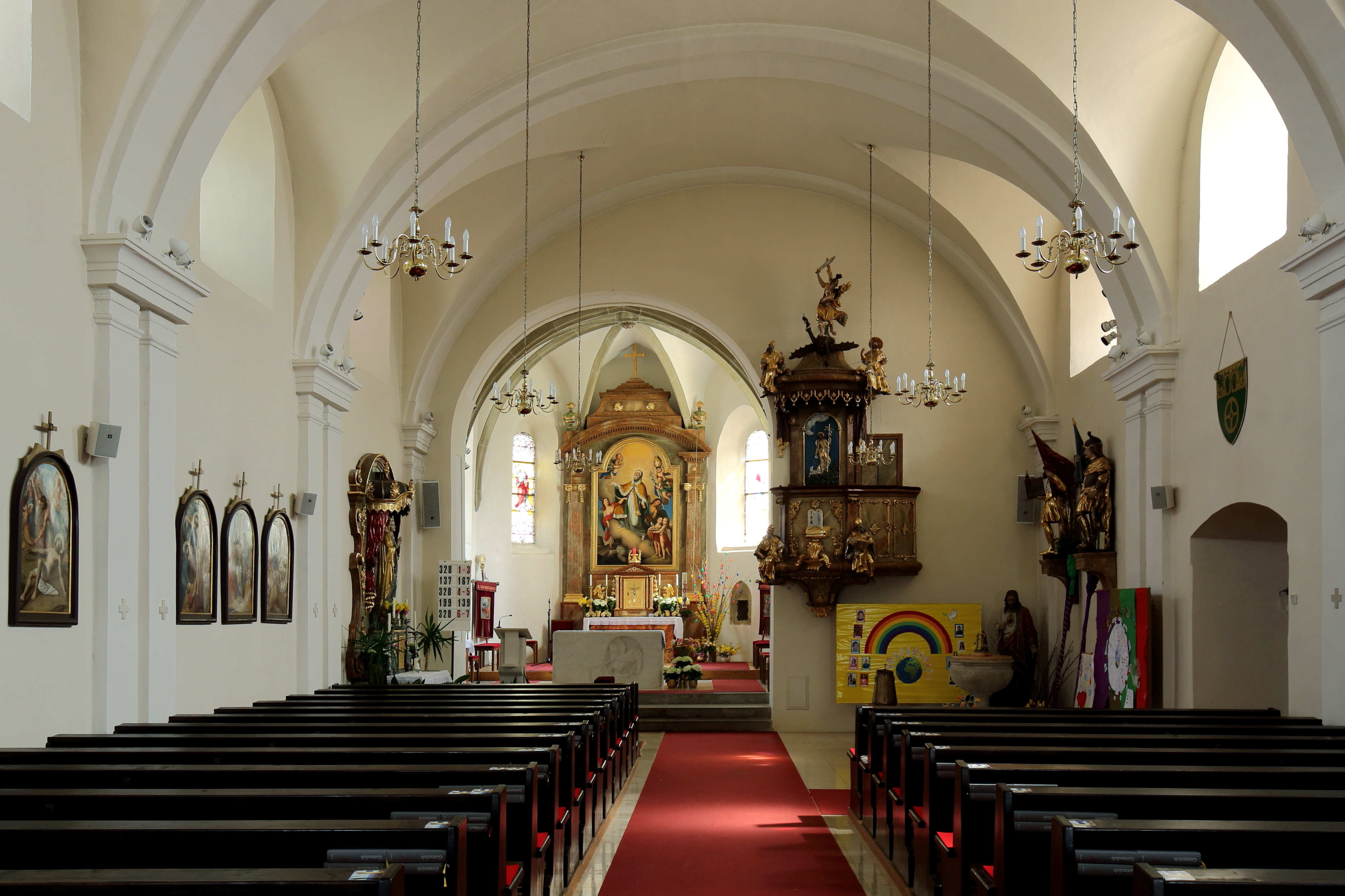 Innenansicht der katholischen Pfarrkirche hl. Nikolaus in der niederösterreichischen Marktgemeinde Großebersdorf.